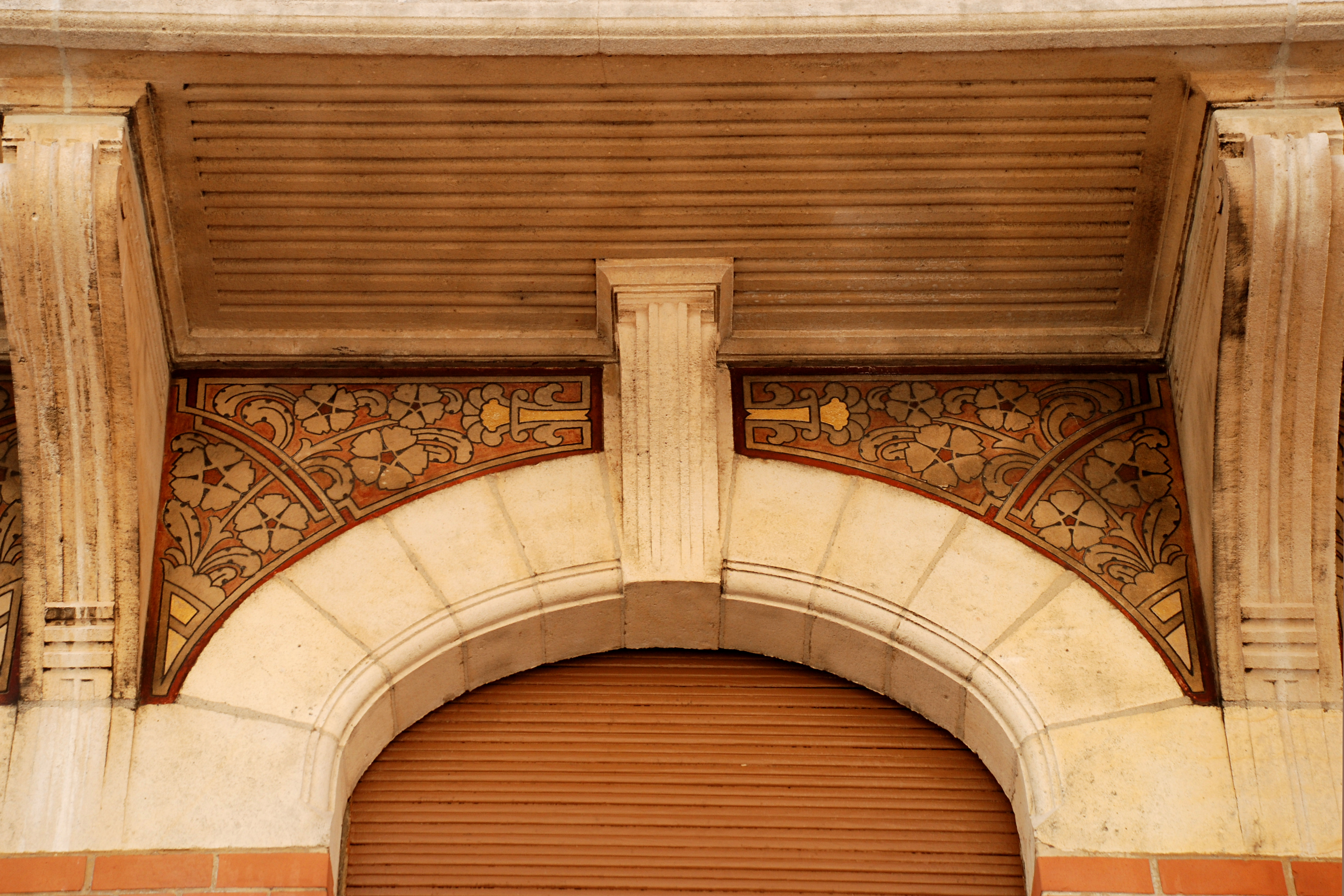 Belgique - Bruxelles - École Rodenbach (Art nouveau - architecte Henri Jacobs - 1905-1911)